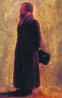 Петр Телушкин. Эскиз Г. Чернецова. 1832 г.